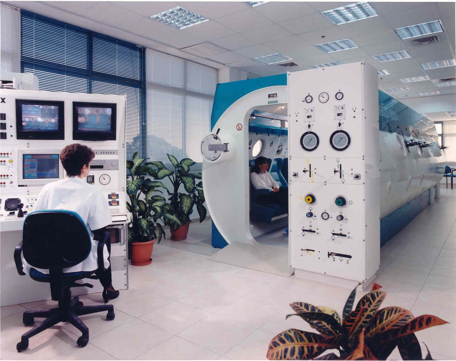 השגחה על מטופלי תא לחץ היפרברי בבי"ח אלישע.